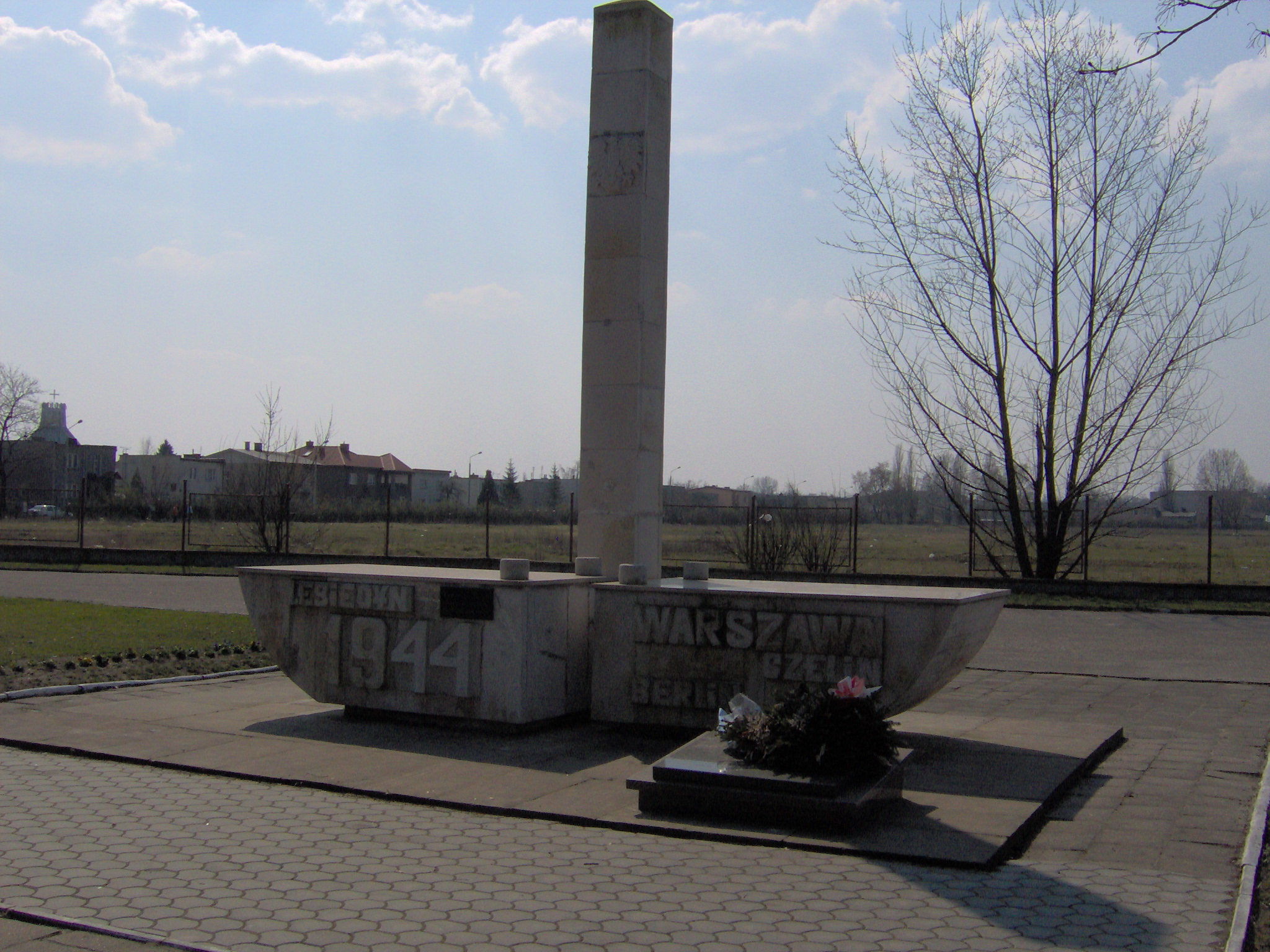 Pomnik Sapera przy ul. Żytniej 69 (2007 r.)